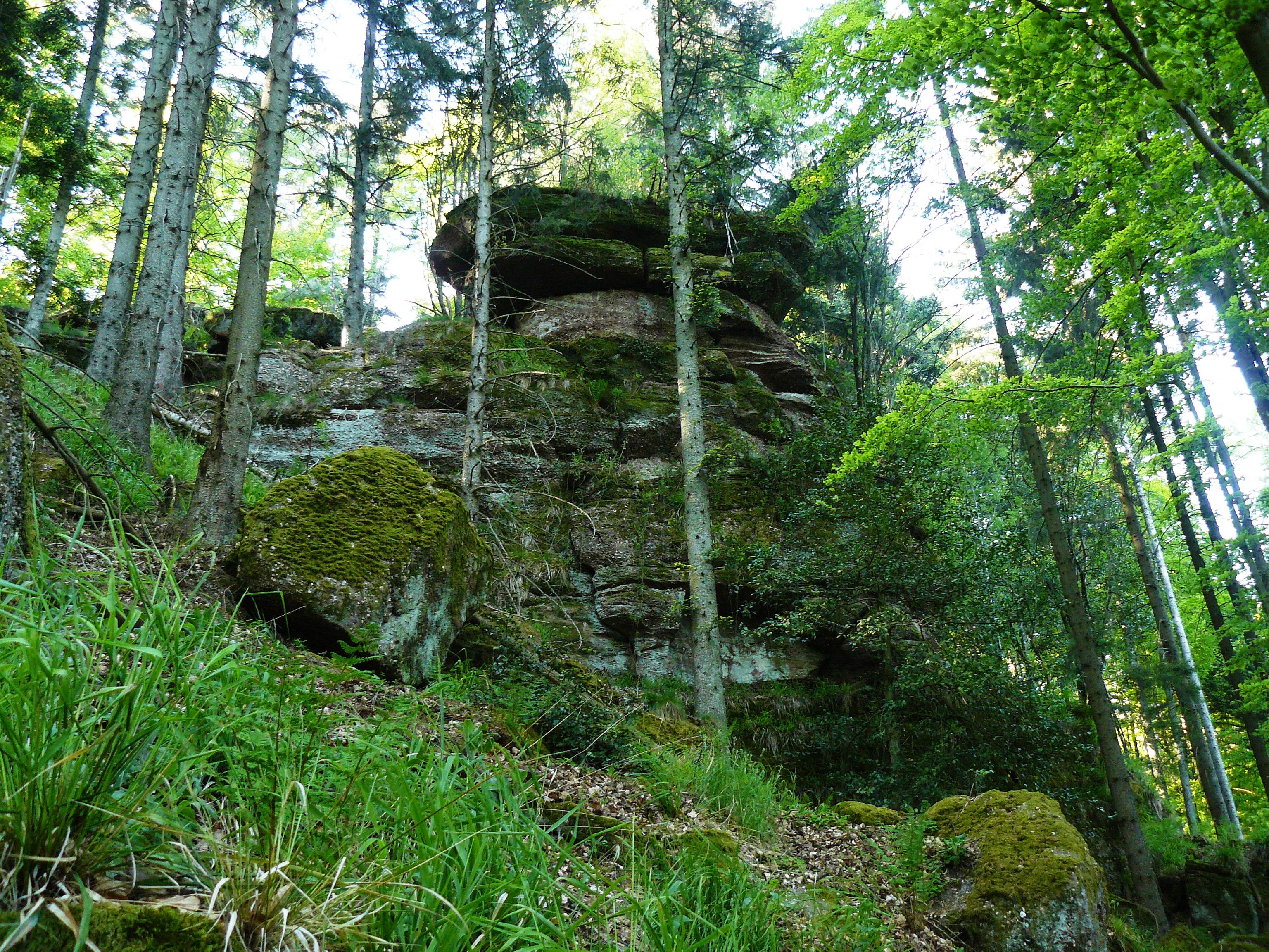 Breitenau, Bas-Rhin, Fr. Rocher du Cheval Tombé (Altitude 660 à 680 mètres